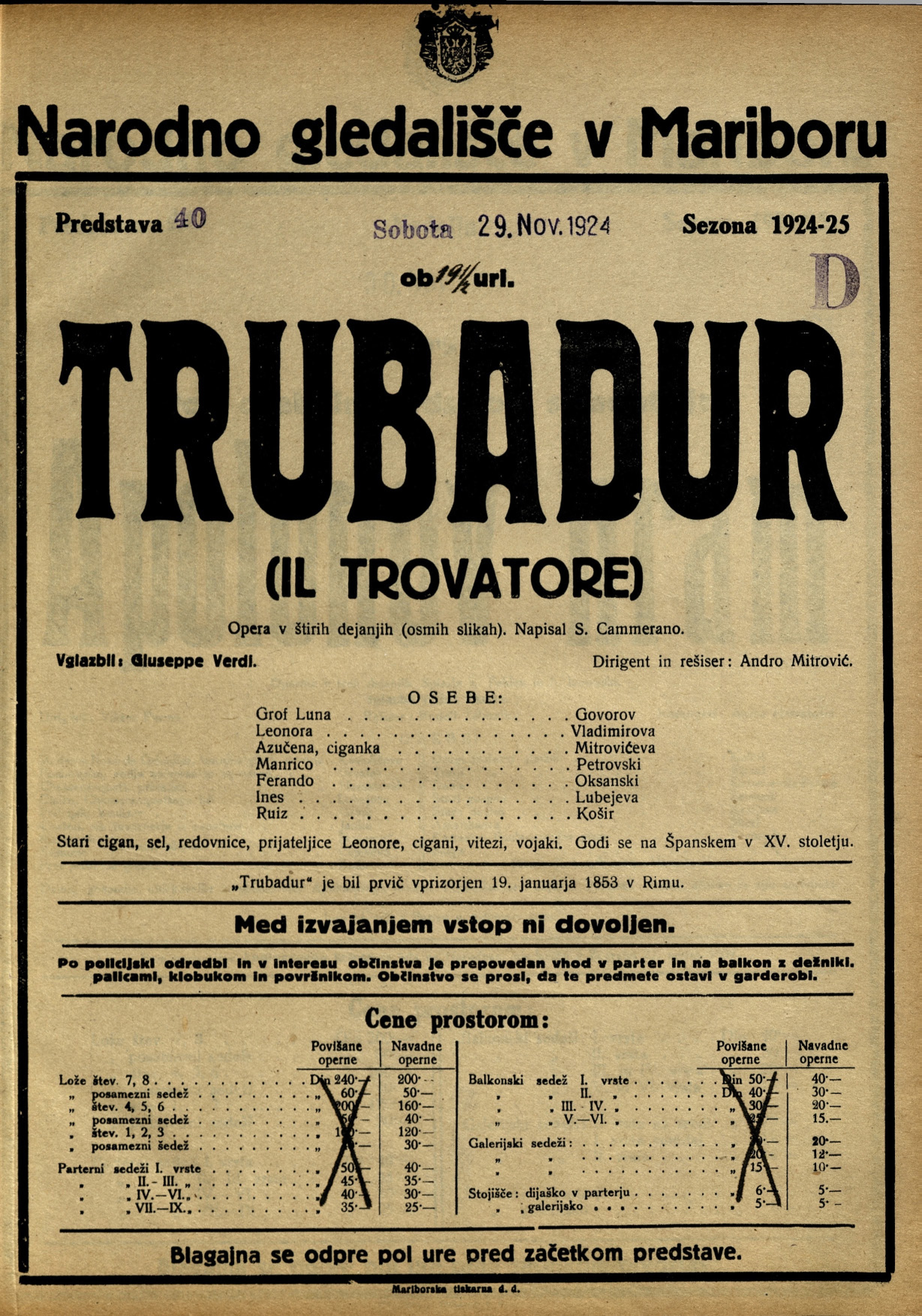 Plakat za predstavo Trubadur v Narodnem gledališču v Mariboru.